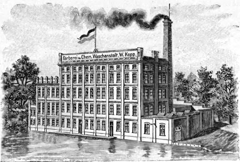 Farbiarnia i pralnia chemiczna Wilhelma Koppa, zlokalizowana w Bydgoszczy, nad Młynówką.